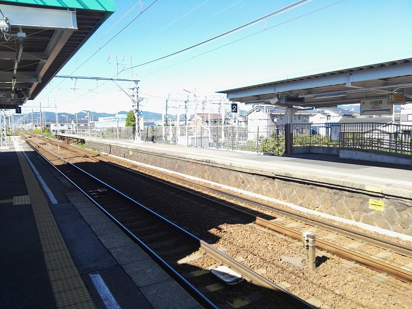 Odabuchi station platform